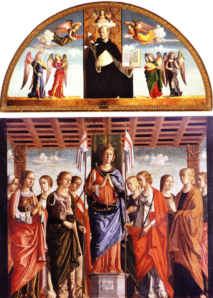 lower part: Pinacoteca di Brera Native namePinacoteca di BreraLocationMilanCoordinates45° 28′ 18.99″ N, 9° 11′ 15.66″ E Established1882Web page control : Q150066 VIAF: 124531732 ISNI: 0000 0001 2192 8674 ULAN: 500302853 LCCN: n50056780 NLA: 35417152 WorldCat institution QS:P195,Q150066 upper part: Civici Musei e Galleria di Storia e Arte Antica, Udine